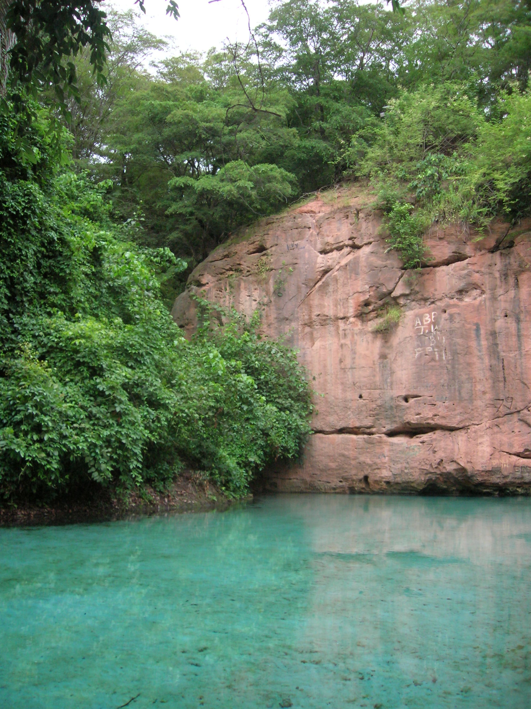 Wikki warm springs, Yankari National park of Nigeria